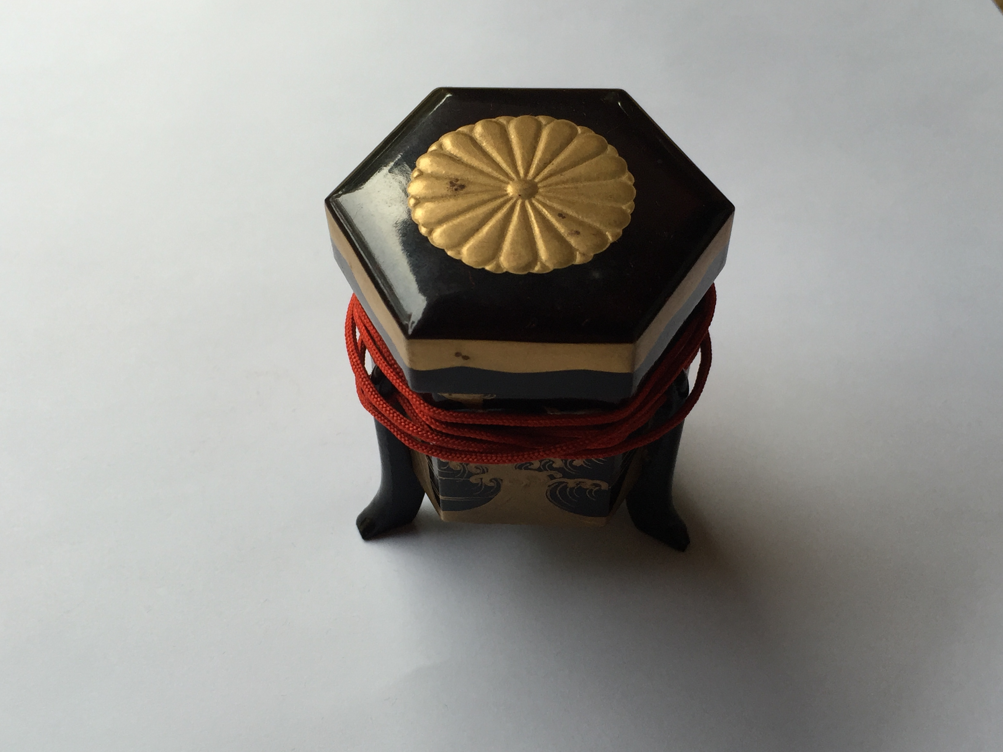 明治期に皇室から下賜されたボンボニエール 六角柱で四つの足がついている。上部には菊のご紋。